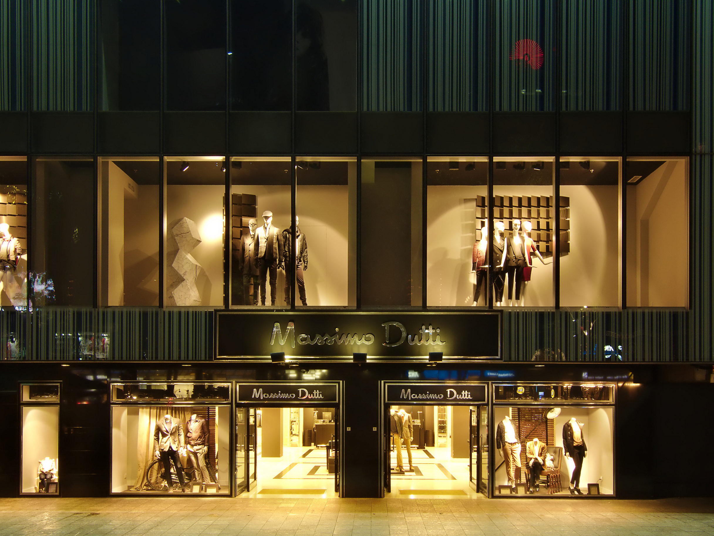 looks posh....